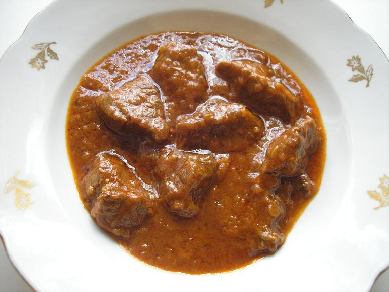 Hovězí guláš